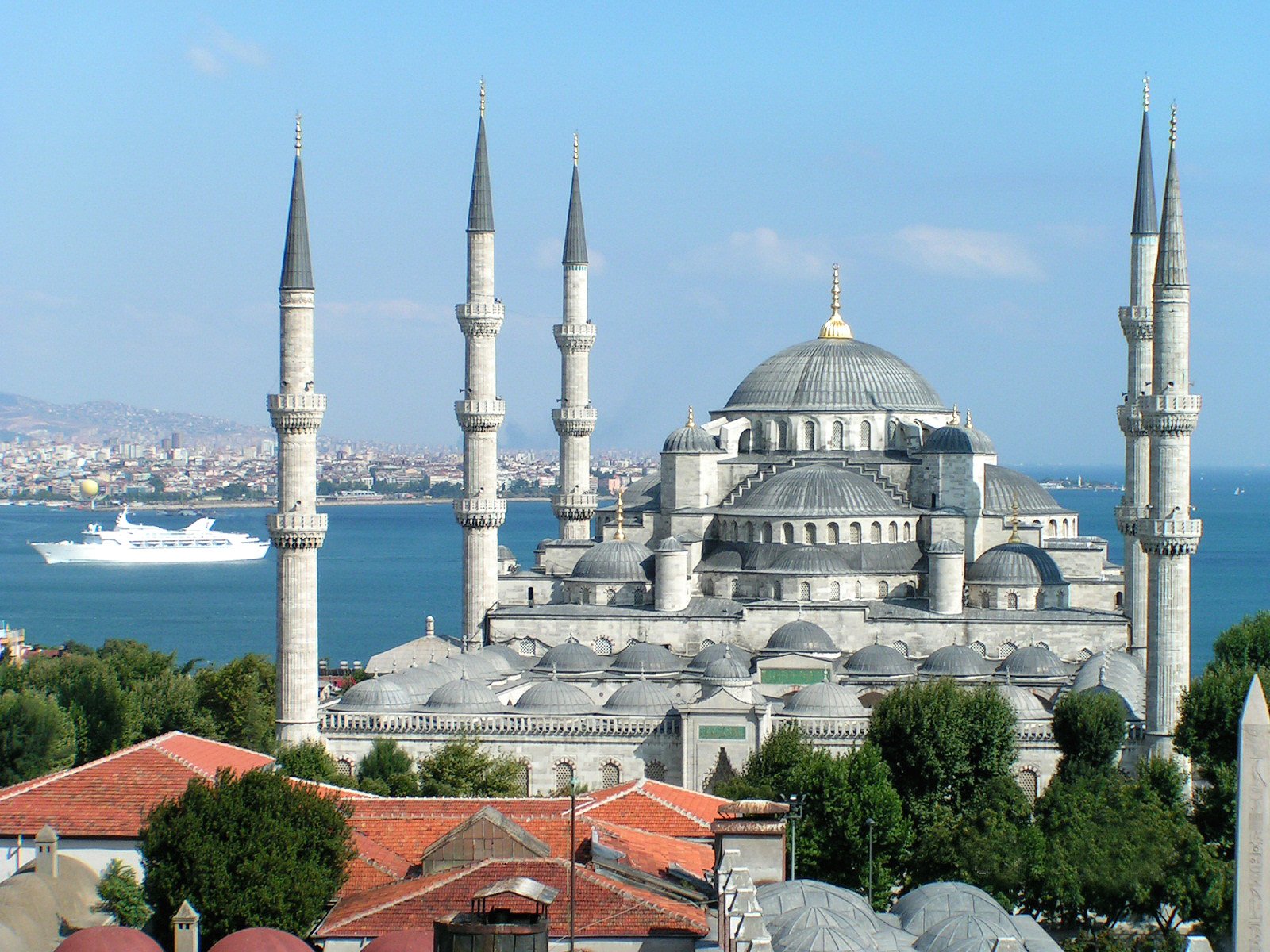 Sultanahmet Camii'nden bir görünüm